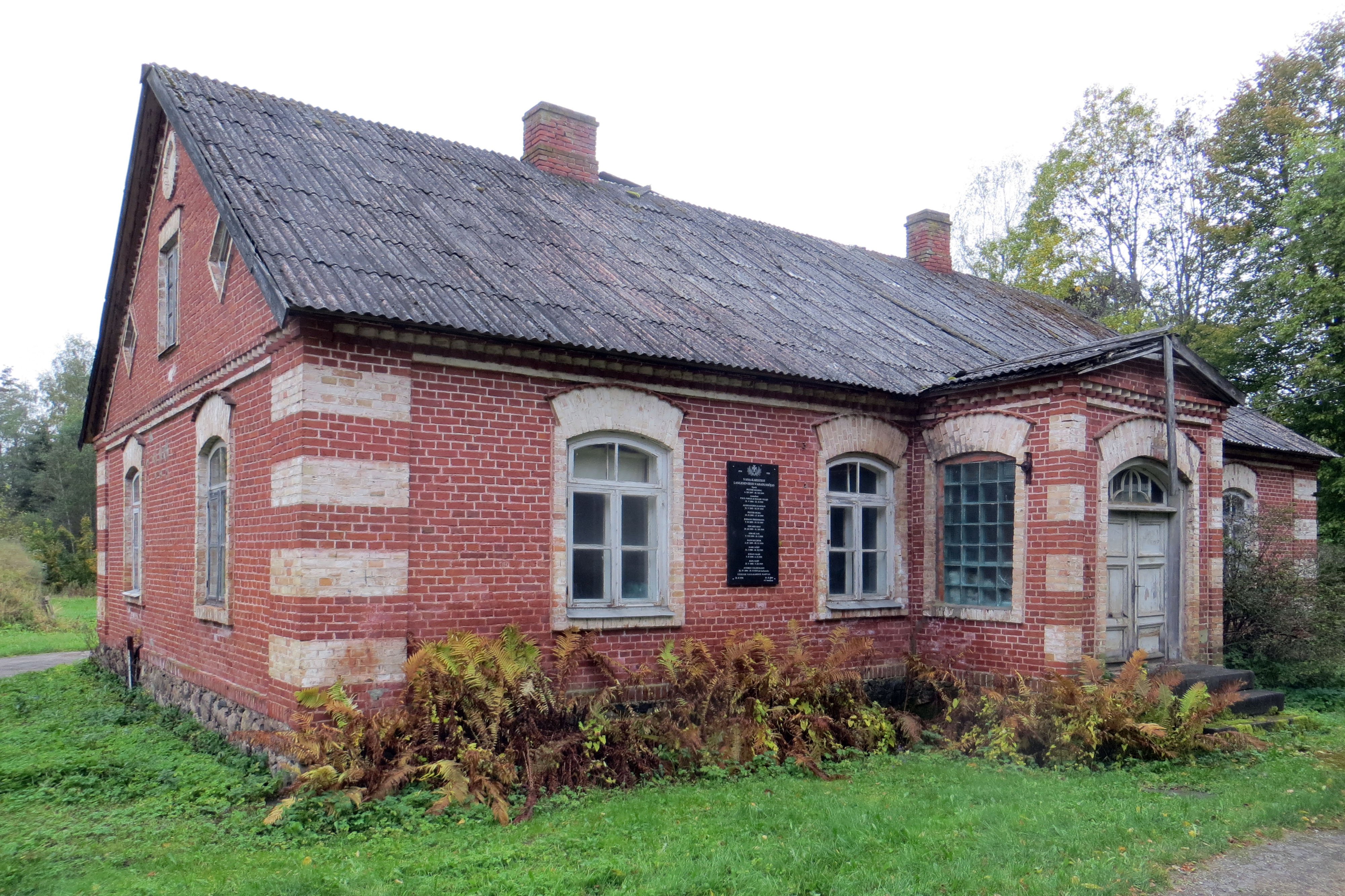 Vallamaja